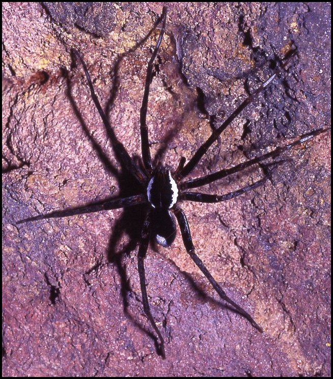 Araignée de la grotte Fourgassié (Guyane française) pouvant être un Ctenidae